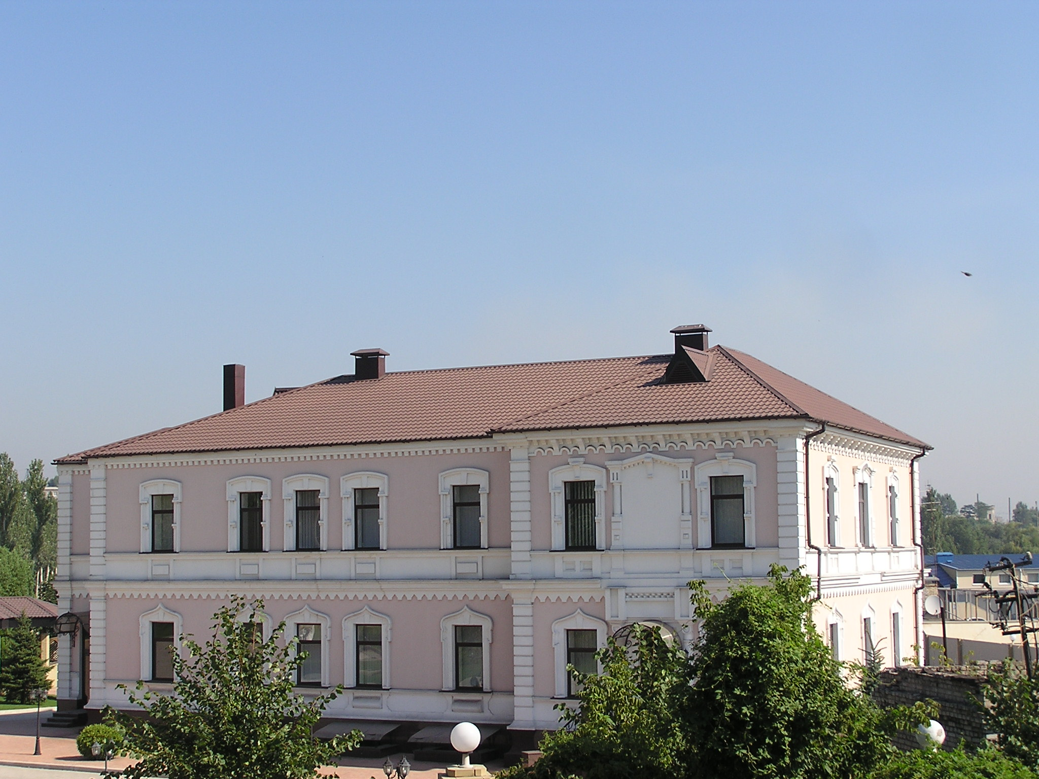 Дом братьев Рутченко.